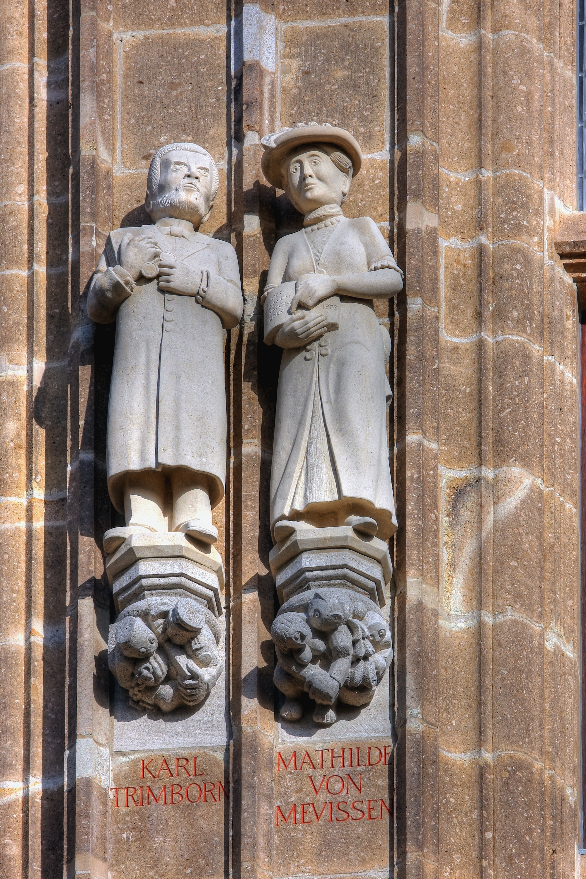 Rathausturm Köln mit den Figuren: Karl Trimborn - Mathilde von Mevissen. Bildhauer beider Statuen: Sepp Hürten Die Konsolen wurden beide von Gerd Haas erstellt. Thema der Konsole unterhalb von Karl Trimborn: „Umzug nach Ossendorf“. Dargestellt ist ein Vollzugsbeamter mit Fernsehgerät, das er einem Häftling mit Käppchen und schwerer Kette mit Kugel entgegenhält. Thema der Konsole unterhalb von Mathilde von Mevissen: „Tännchenklau“.